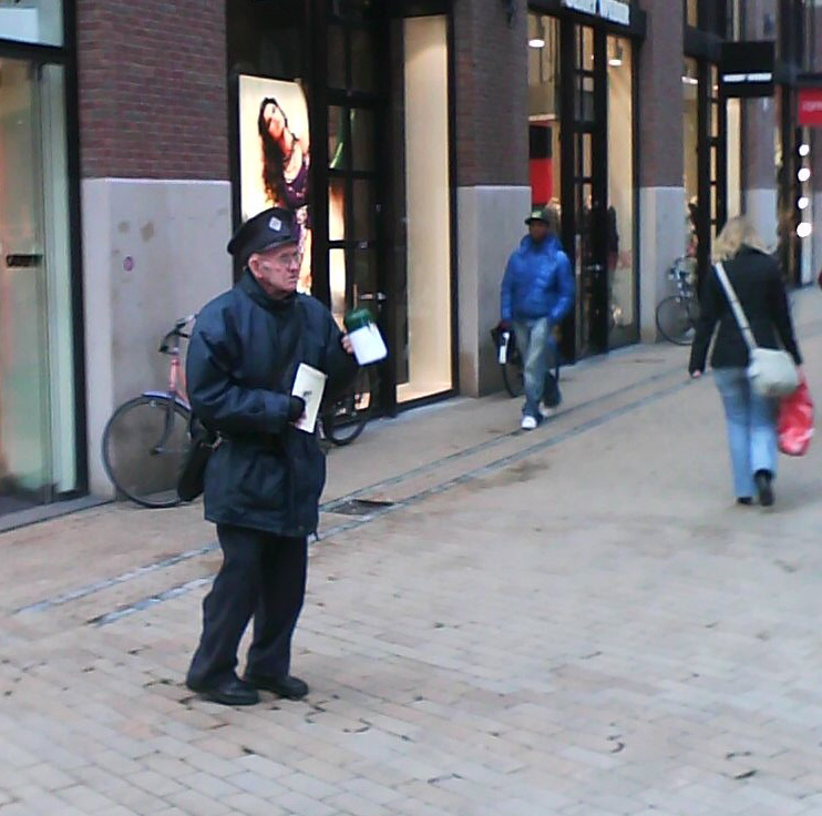 Sergeant Jacob Wildeman, al ruim 40 jaar het gezicht van het Noordelijk Heilsleger.